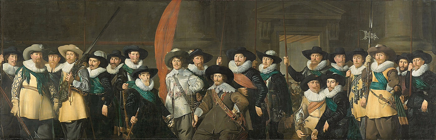 Schutters van de compagnie van kapitein Jacob Symonsz de Vries en luitenant Dirck de Graeff